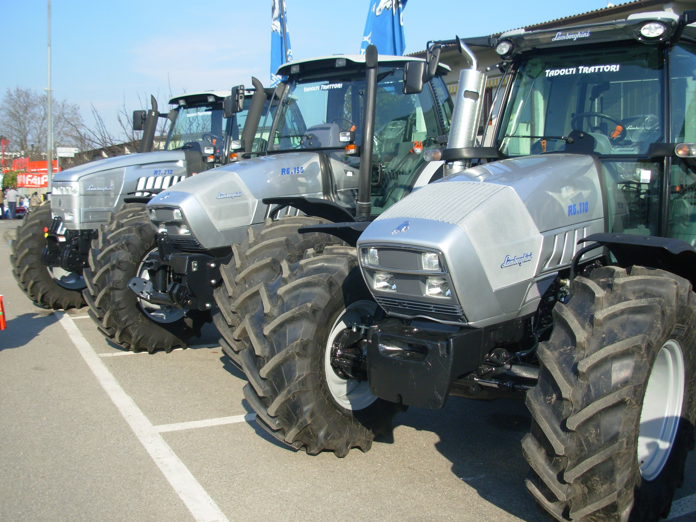 Trattori Lamborghini (R7.210, R6.150, R6.110)